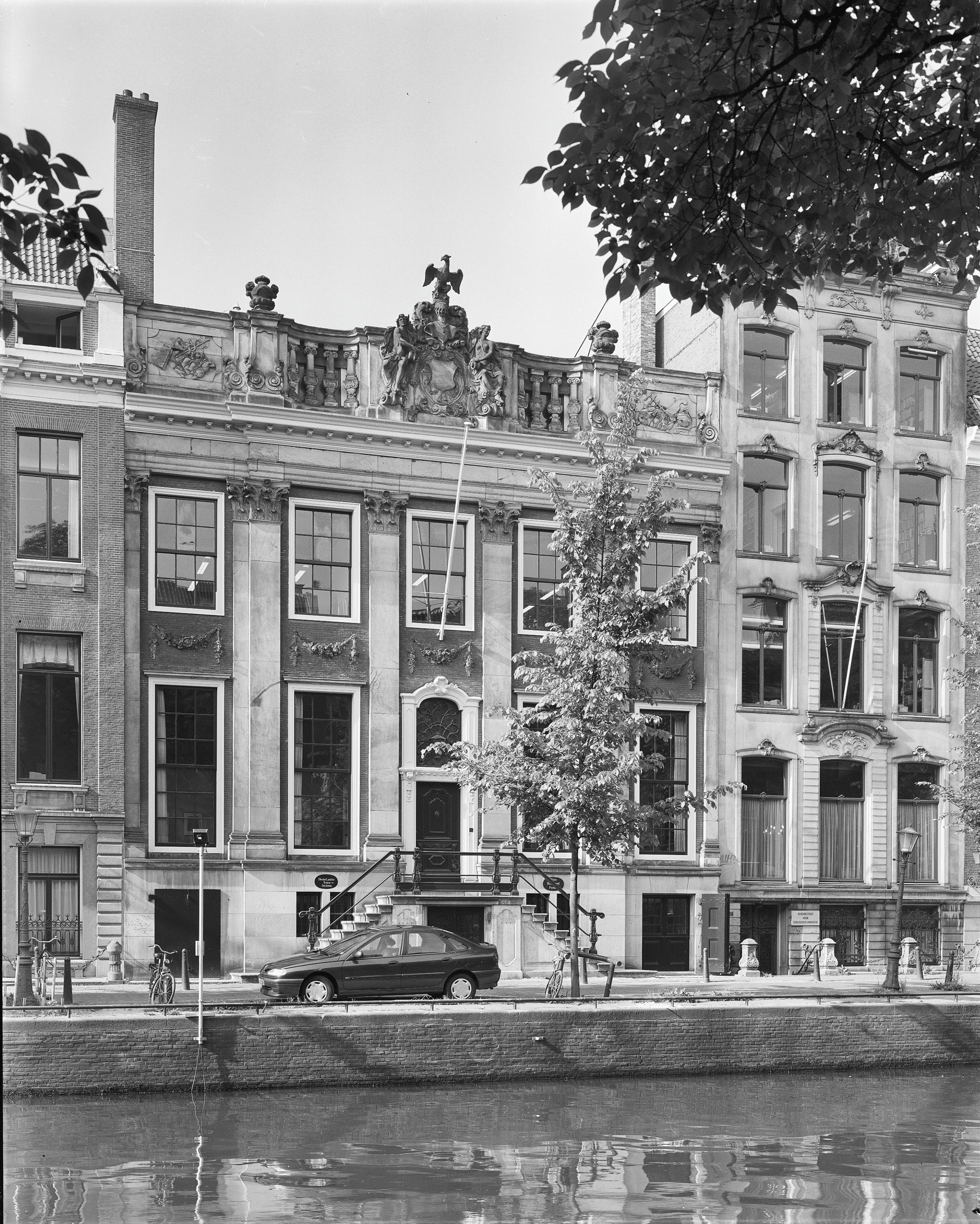 PRINS BERNHARD FONDS: Exterieur VOORGEVEL, OVERZICHT